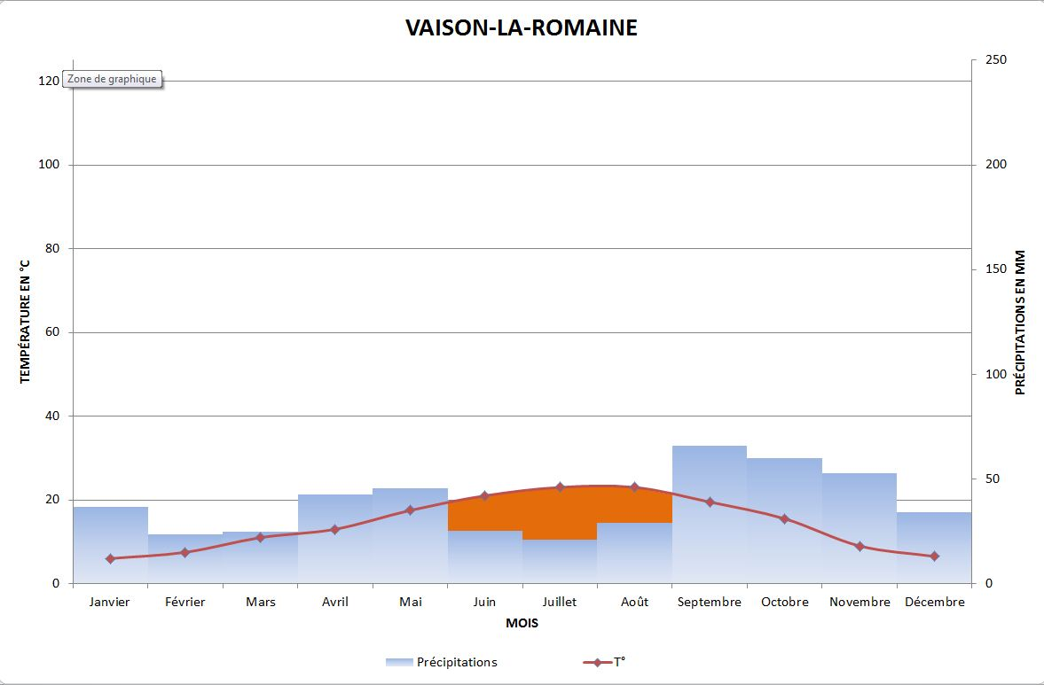 Climatogramme représentant le climat de Vaison-la-Romaine(84) selon les normales 1971-2000